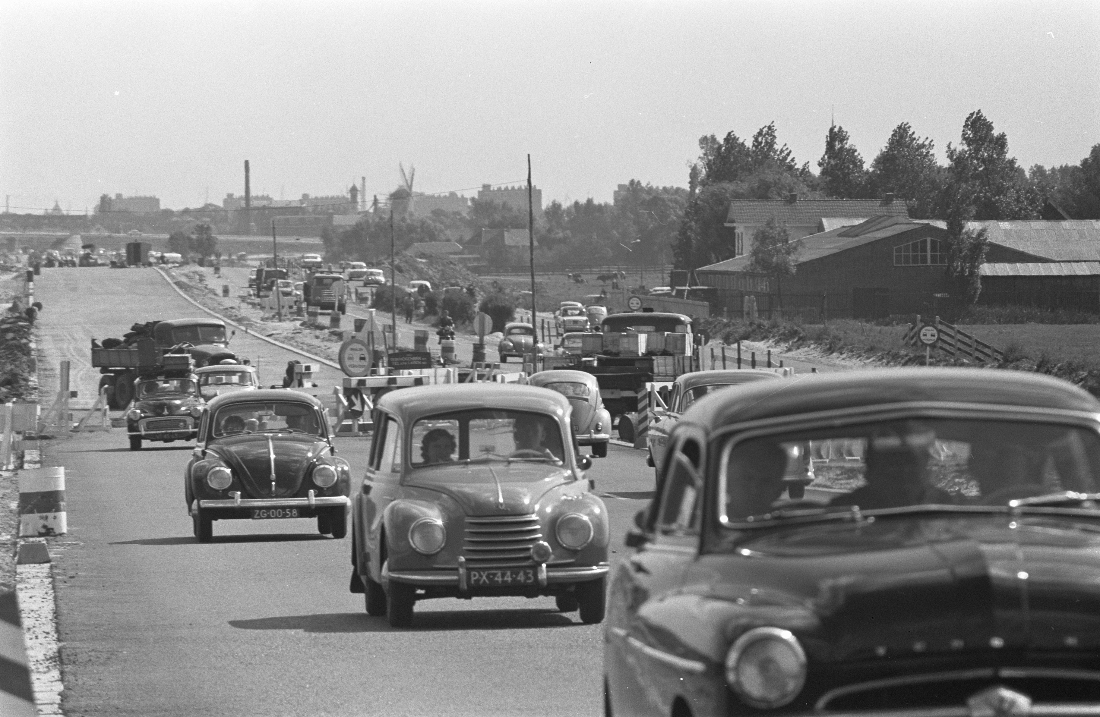 Collectie / Archief : Fotocollectie Anefo Reportage / Serie : [ onbekend ] Beschrijving : Werkzaamheden Rijksweg 13 over van de 6 banenweg overzicht bij Overschie Datum : 2 september 1959 Locatie : Overschie Trefwoorden : Rijkswegen, Werkzaamheden, overzichten Fotograaf : Pot, Harry / Anefo Auteursrechthebbende : Nationaal Archief Materiaalsoort : Negatief (zwart/wit) Nummer archiefinventaris : bekijk toegang 2.24.01.05 Bestanddeelnummer : 910-6443